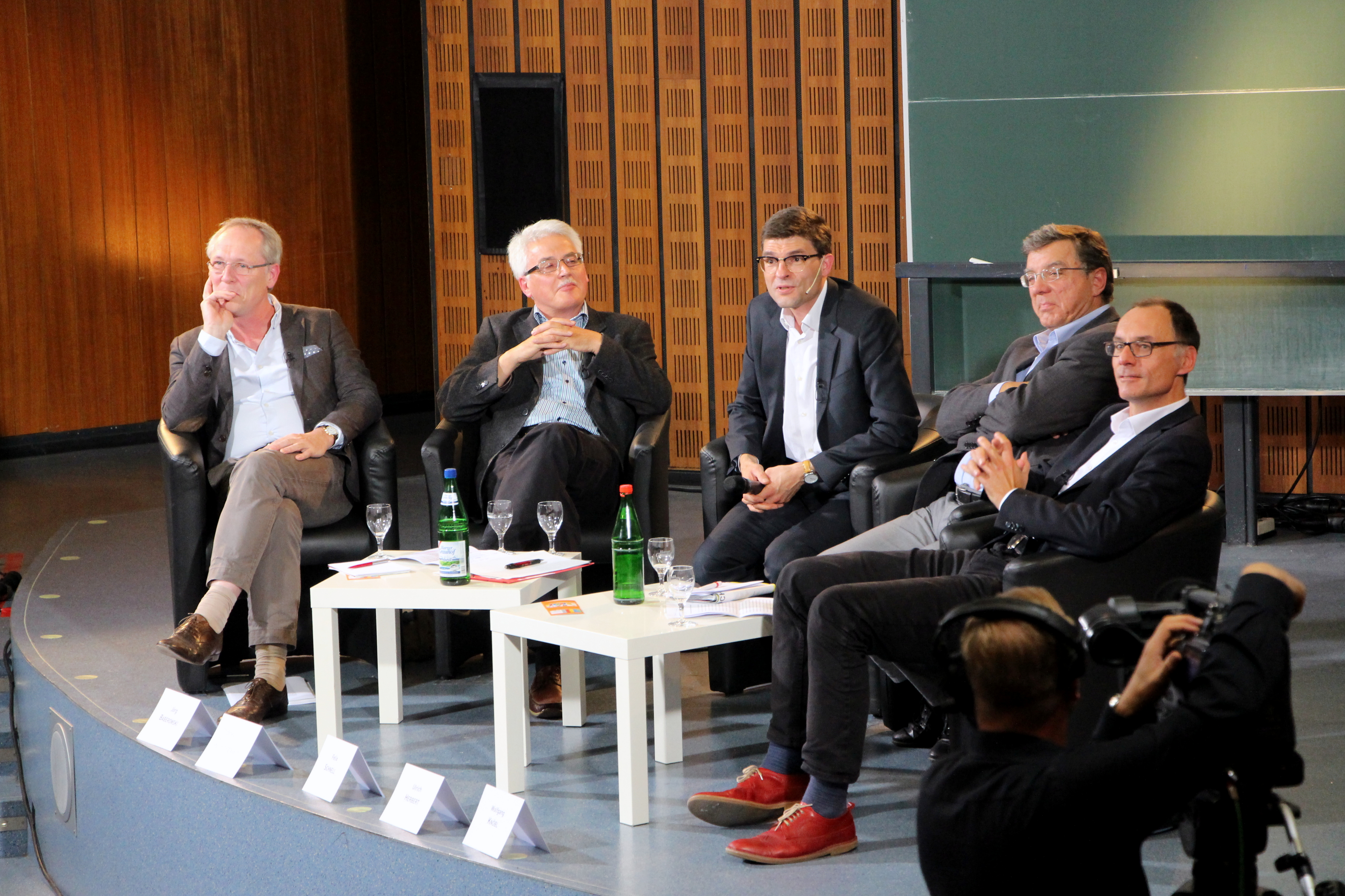 Historikertag 2014 in Göttingen.